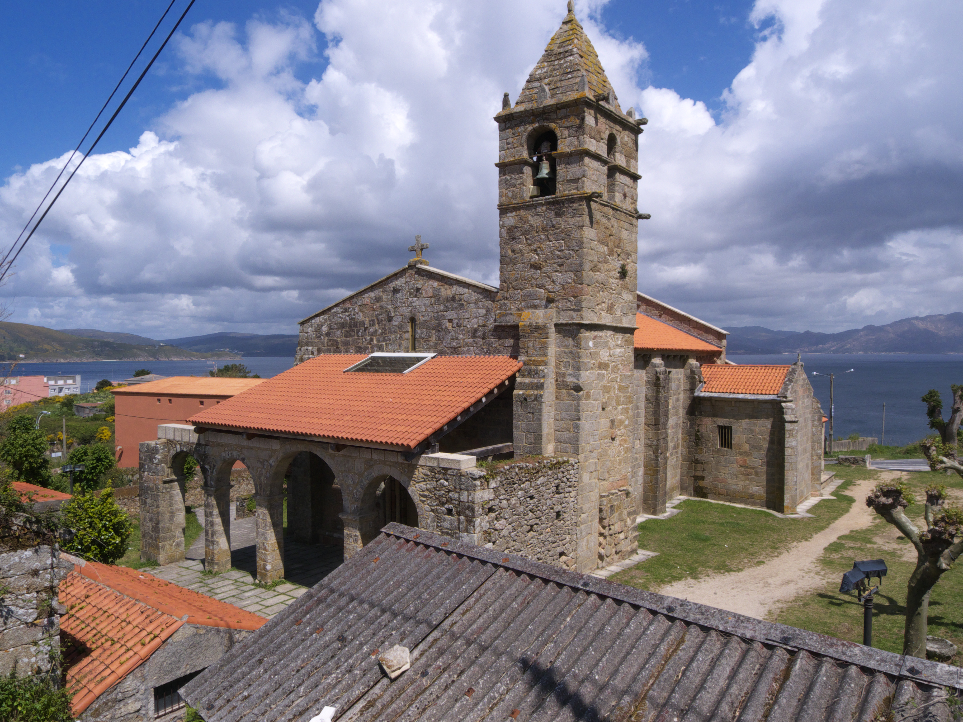 En esta iglesia se venera a la patrona de Finisterre, la Virgen de las Arenas.